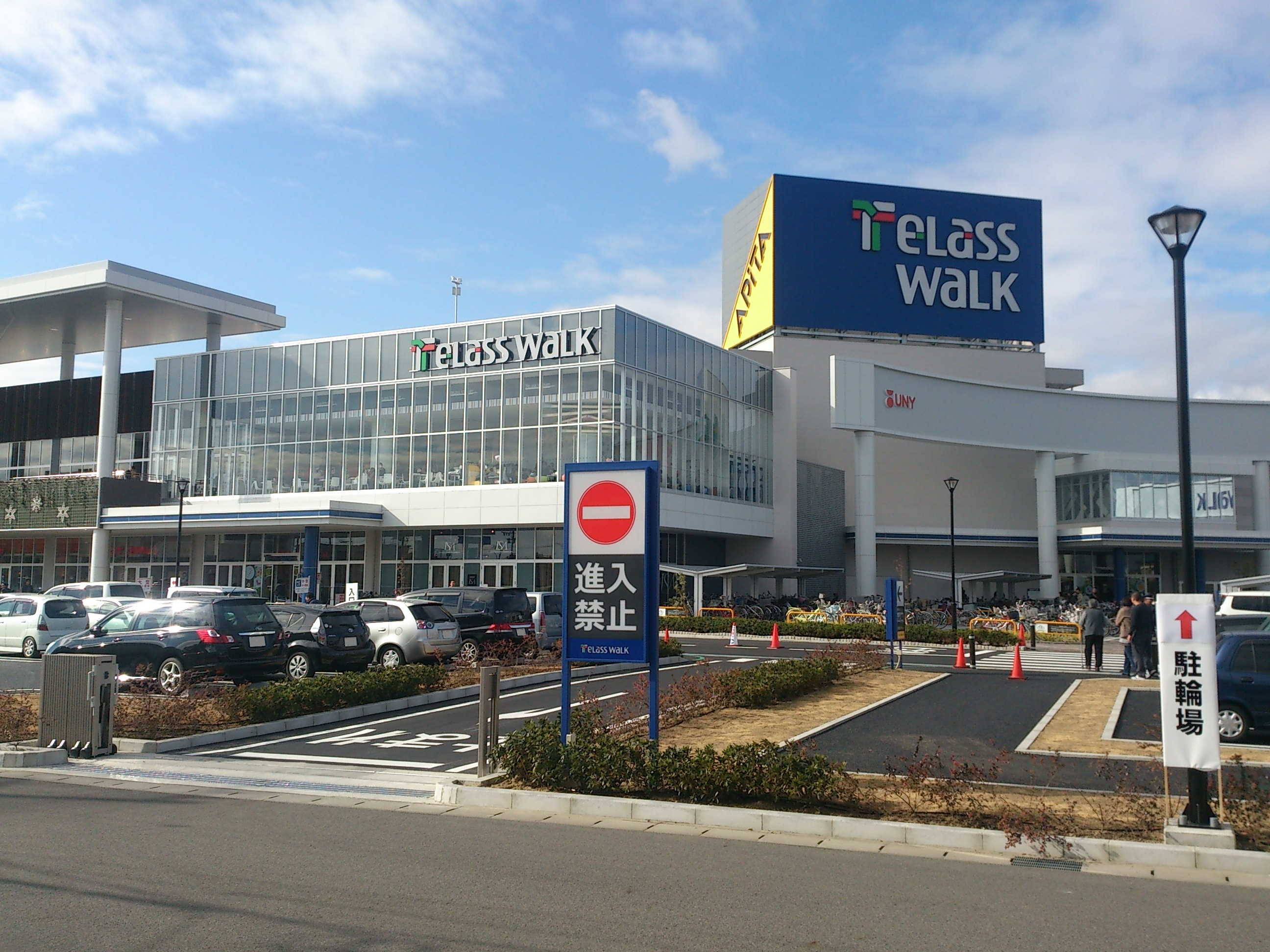 テラスウォーク概観写真